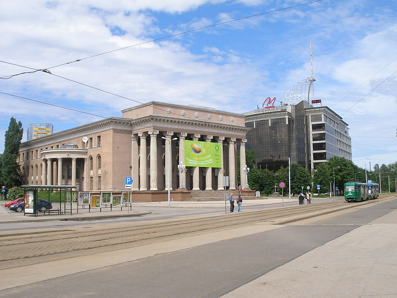 Maison de la culture de l'entreprise VEF. Photographiée par Jānis Vilniņš en 2010.